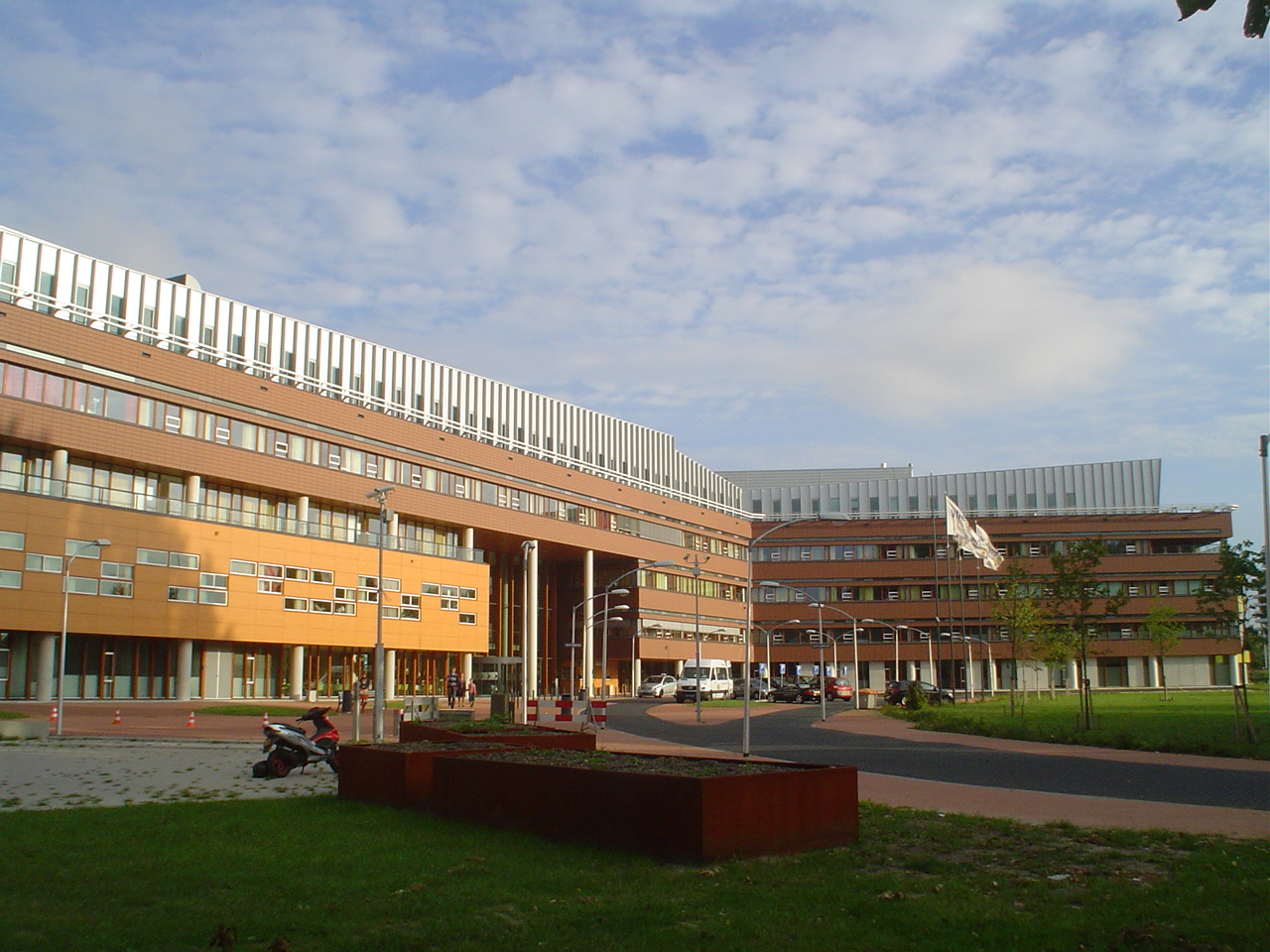 Nieuwbouw van het Vlietland Ziekenhuis te Schiedam